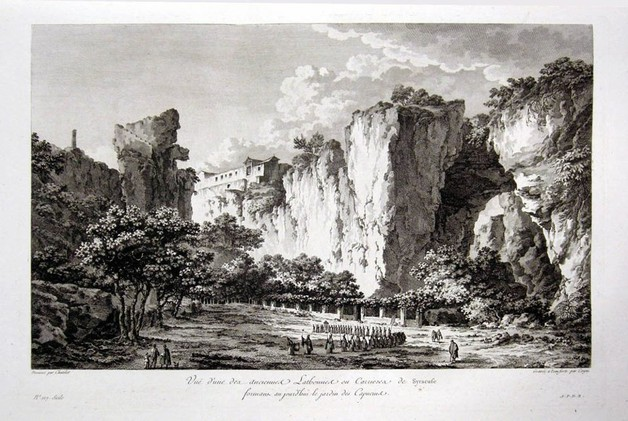 Latomia dei Cappuccini, Siracusa (Sicily)